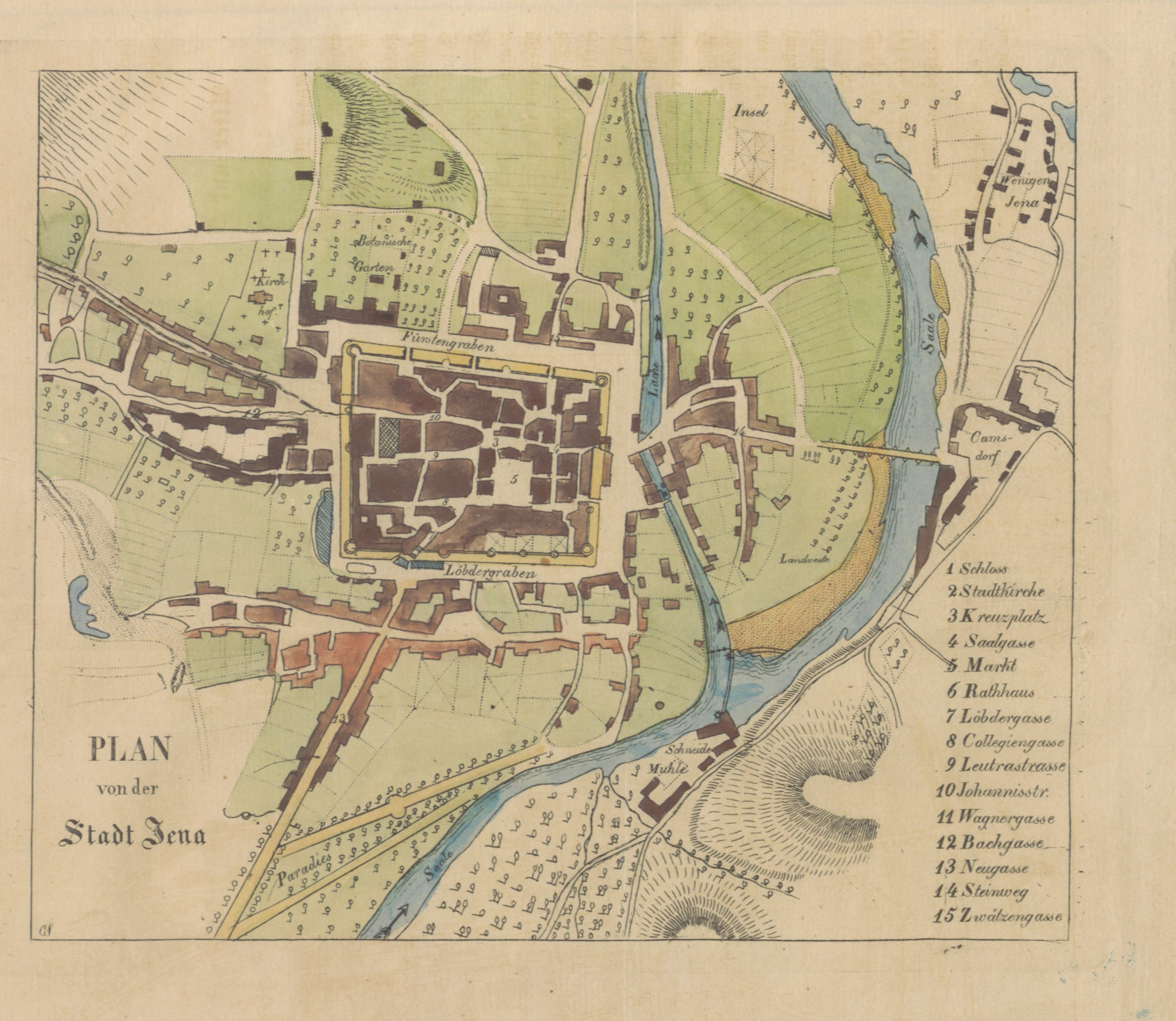 Karte aus "Jena von seinem Ursprunge bis zur neuesten Zeit, nach A. Beier ... Mit Kupfern, Karten, etc."